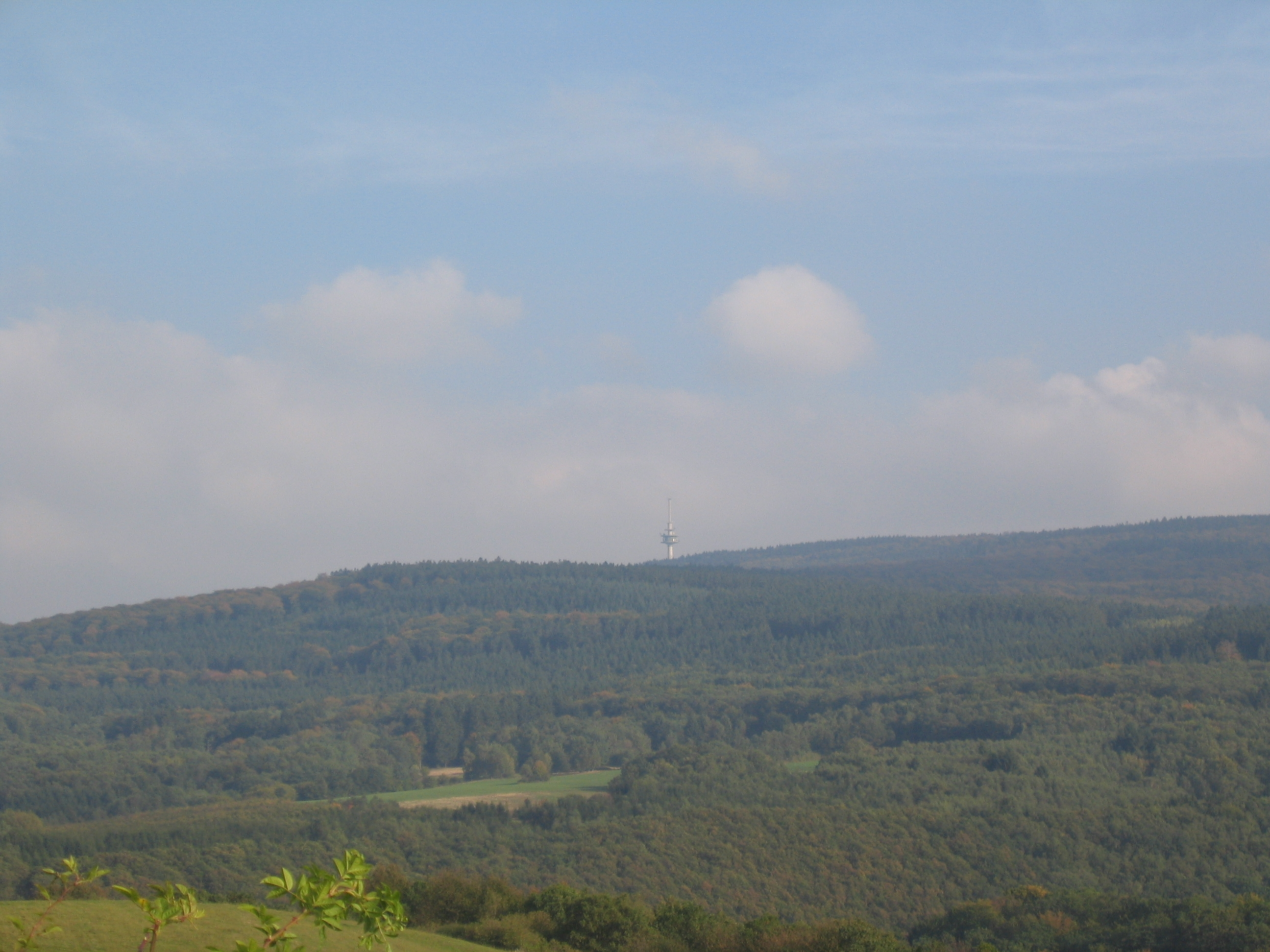 Kahlheid von der Wetterwarte Römerkirch aus betrachtet